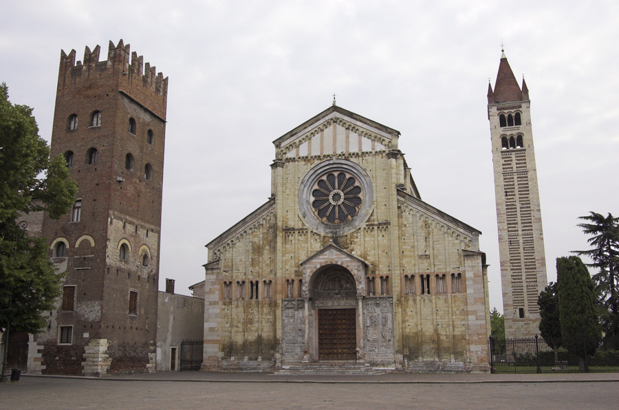 La basilica romanica di San Zeno a Verona